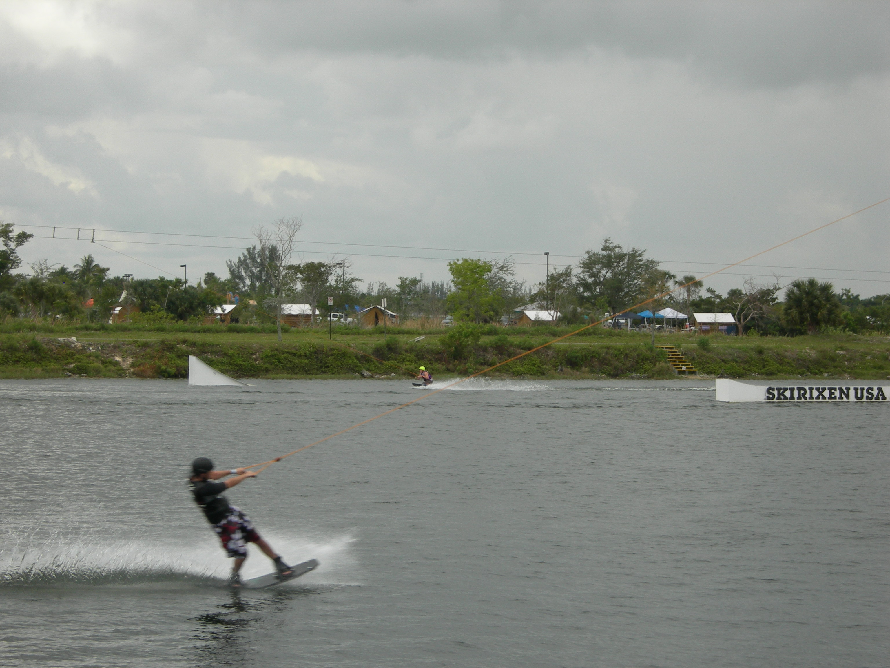 Waterskiing at Quiet Waters Park, Deerfield Beach